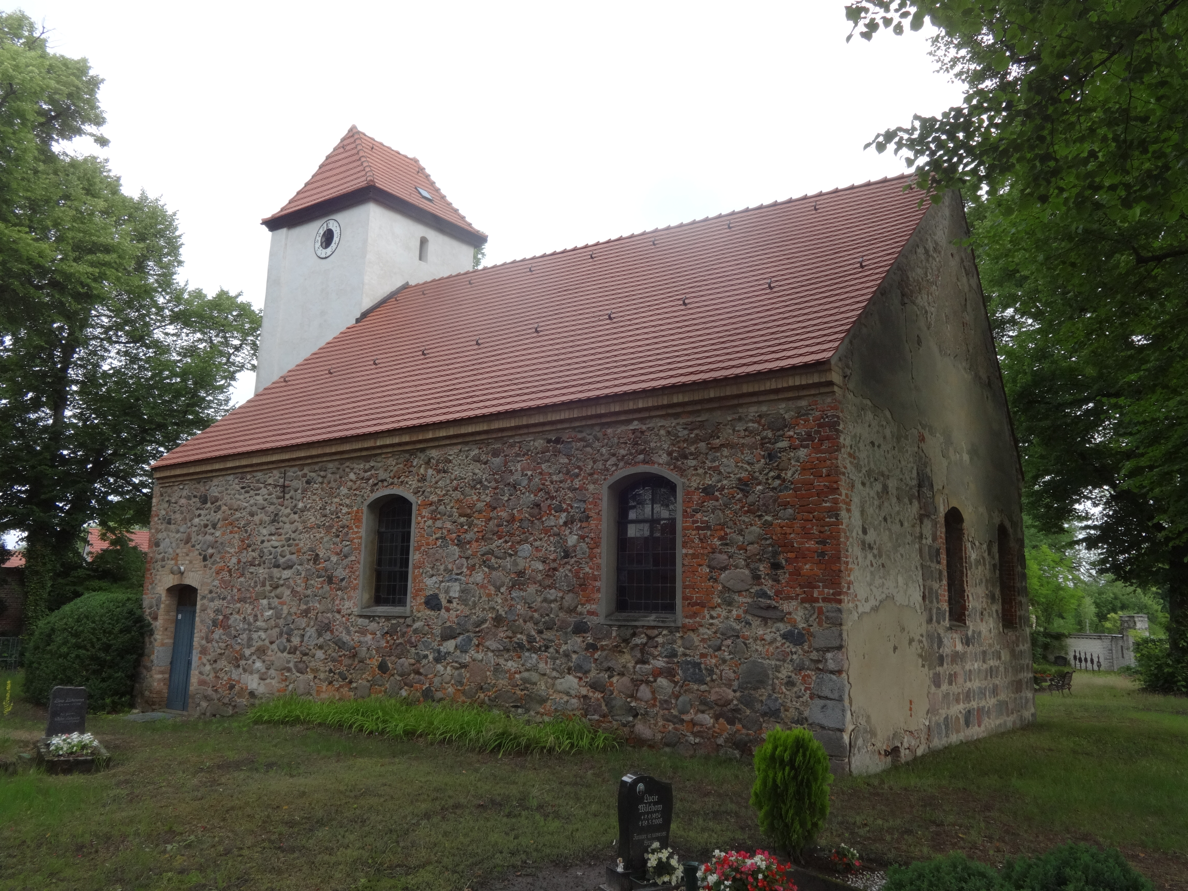 Die Dorfkirche Kiekebusch in Schönefeld (Brandenburg) entstand vermutlich im 14. Jahrhundert und wurde in den Jahren 1693 und 1694 nach Süden hin durch den Anbau einer Patronatsloge erweitert. In seinem Innern steht unter anderem ein Altar aus der zweiten Hälfte des 17. Jahrhunderts.